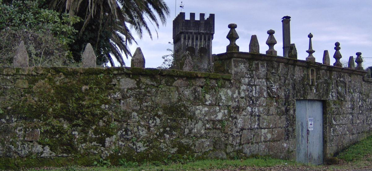 O pazo de Eiras saúda ós transeúntes que se achegan á parroquia. (imaxe propia) Licensing Categoría:Imaxes de San Amaro